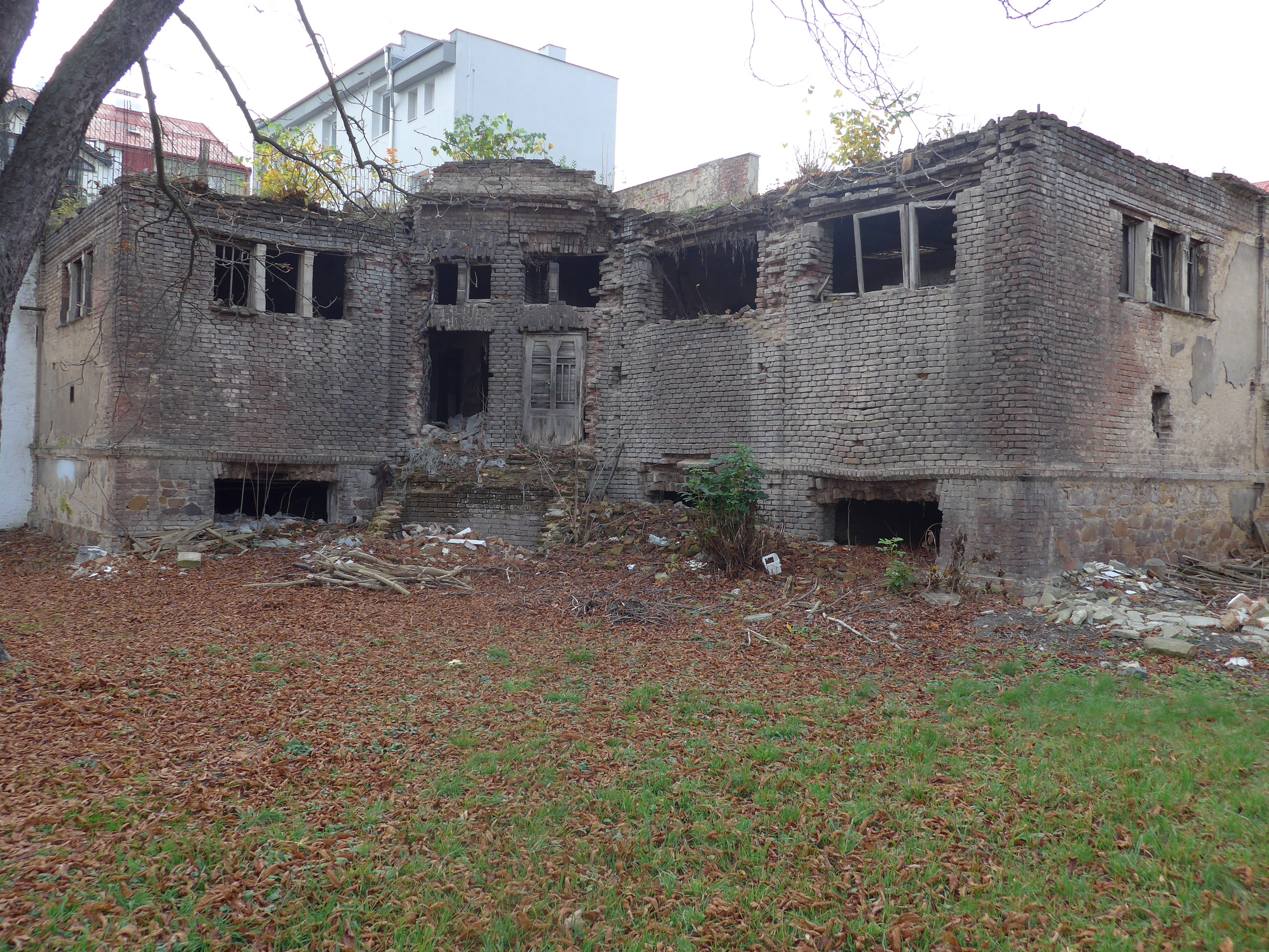 Lidové sprchové lázně (Teplice)